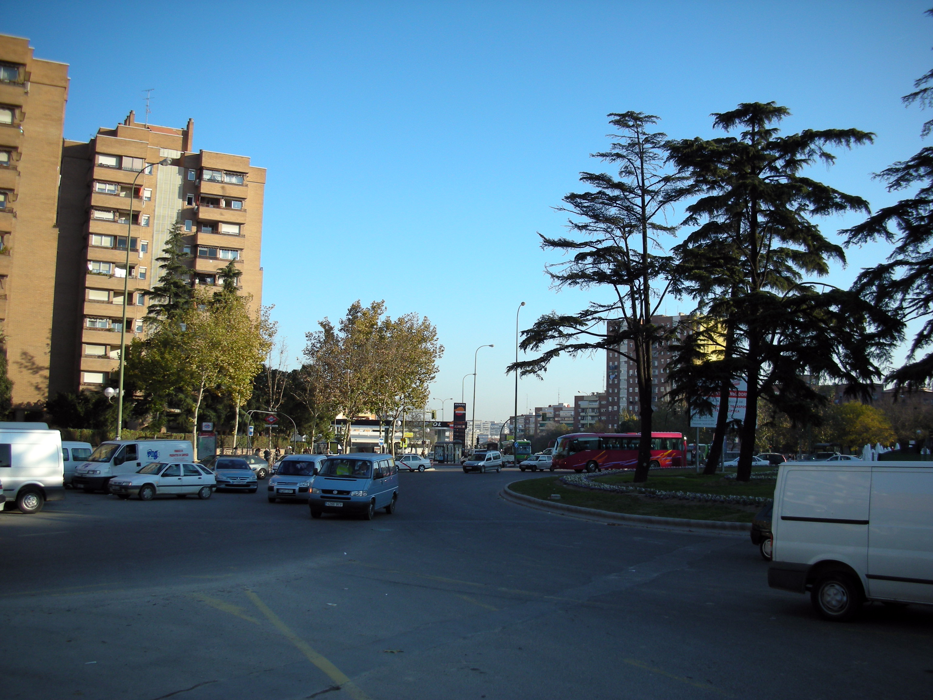 Plaza Elíptica de Madrid desde la calle de la Vía